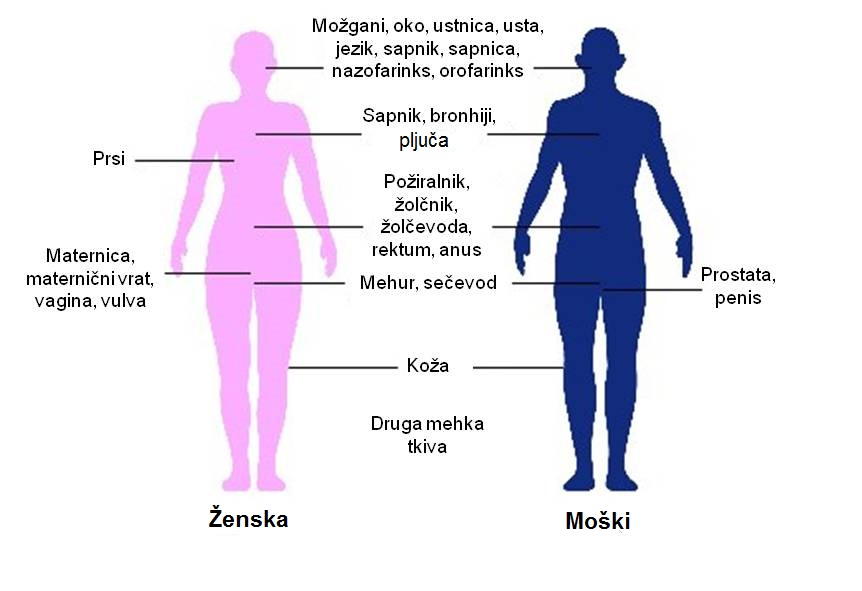 Deli telesa, pri katerih se za zdravljenje raka lahko uporablja brahiterapija